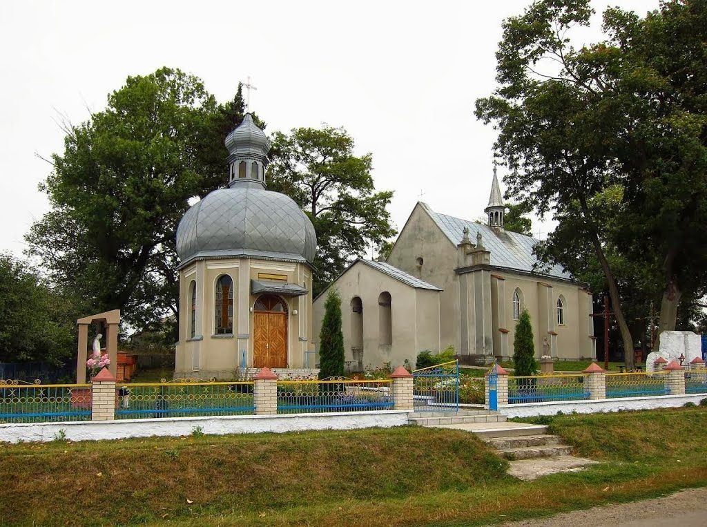 Церква Собору Пресвятої Богородиці